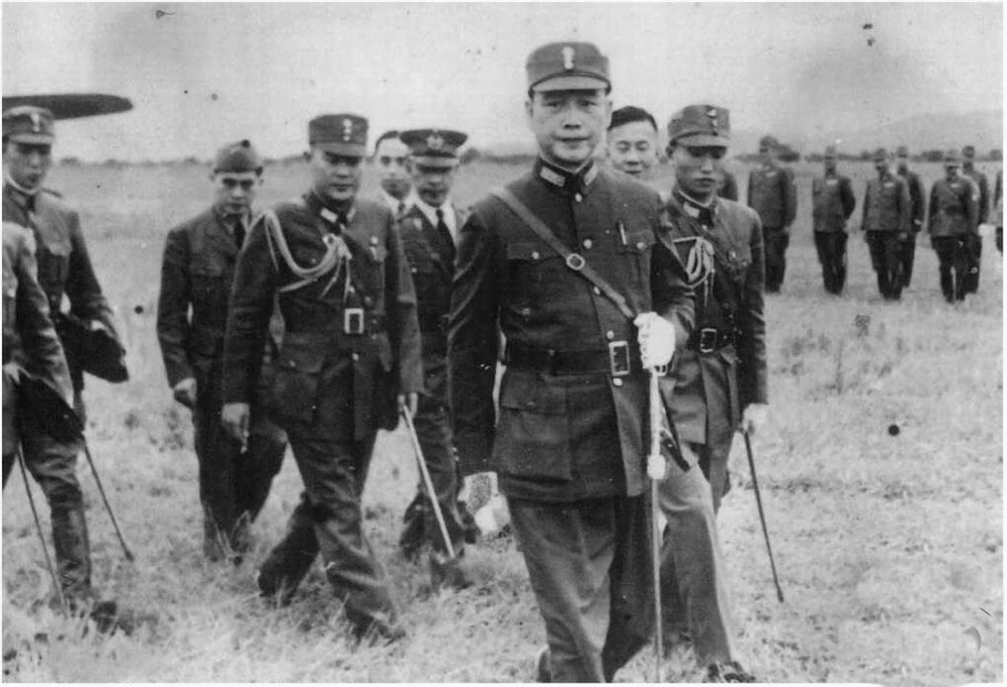 汪兆銘と和平建国軍高官ら。